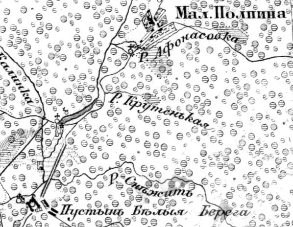 Белобережская пустынь на трехверстной карте Шуберта